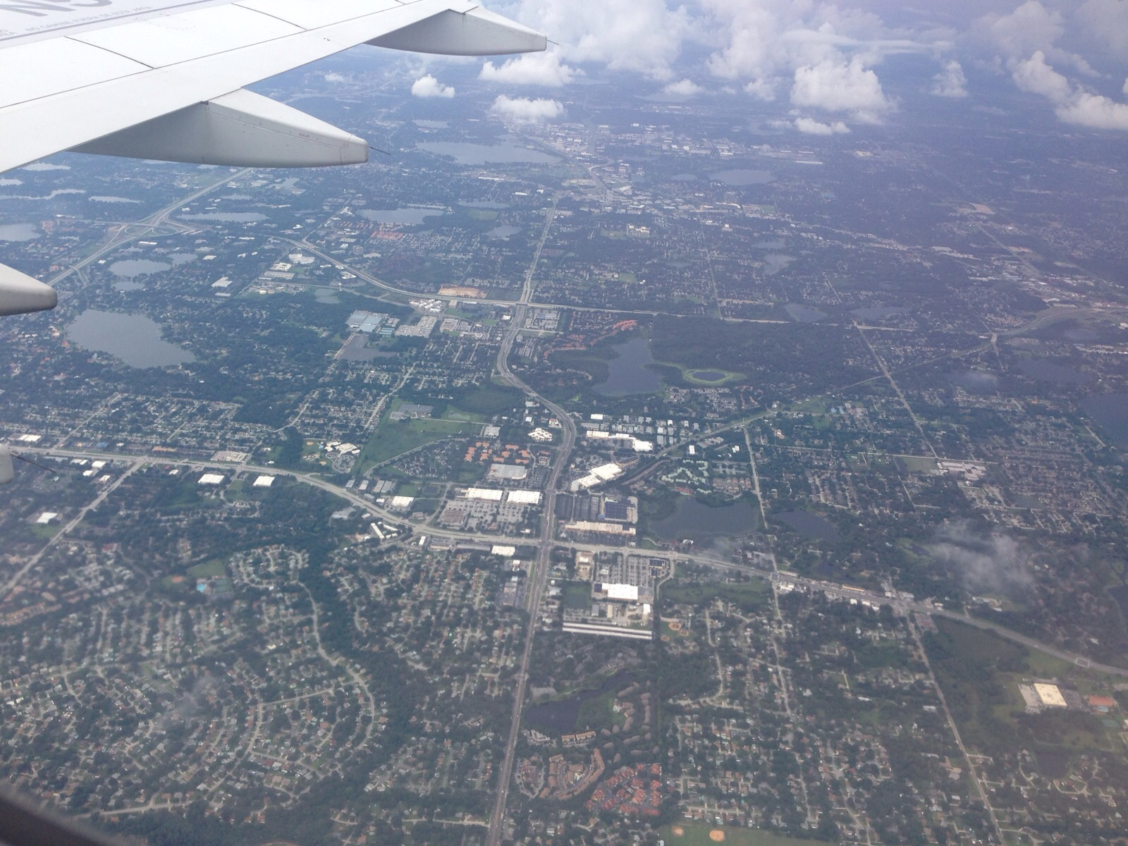 Vista desde el avión de Orlando Florida